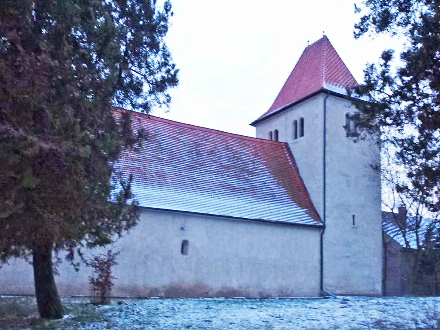 Kirche in Größgöhren